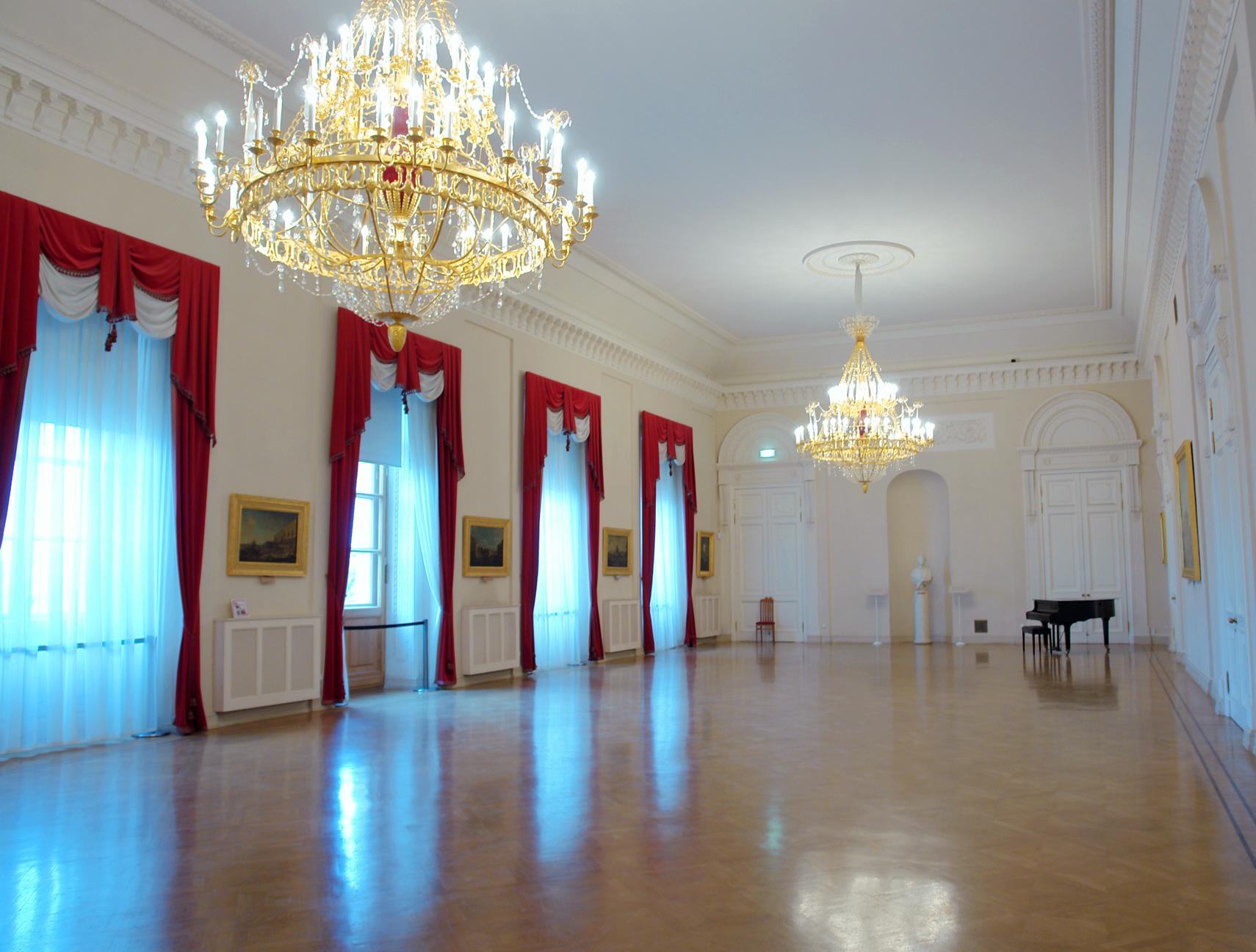 Зала в Михайловском замке.